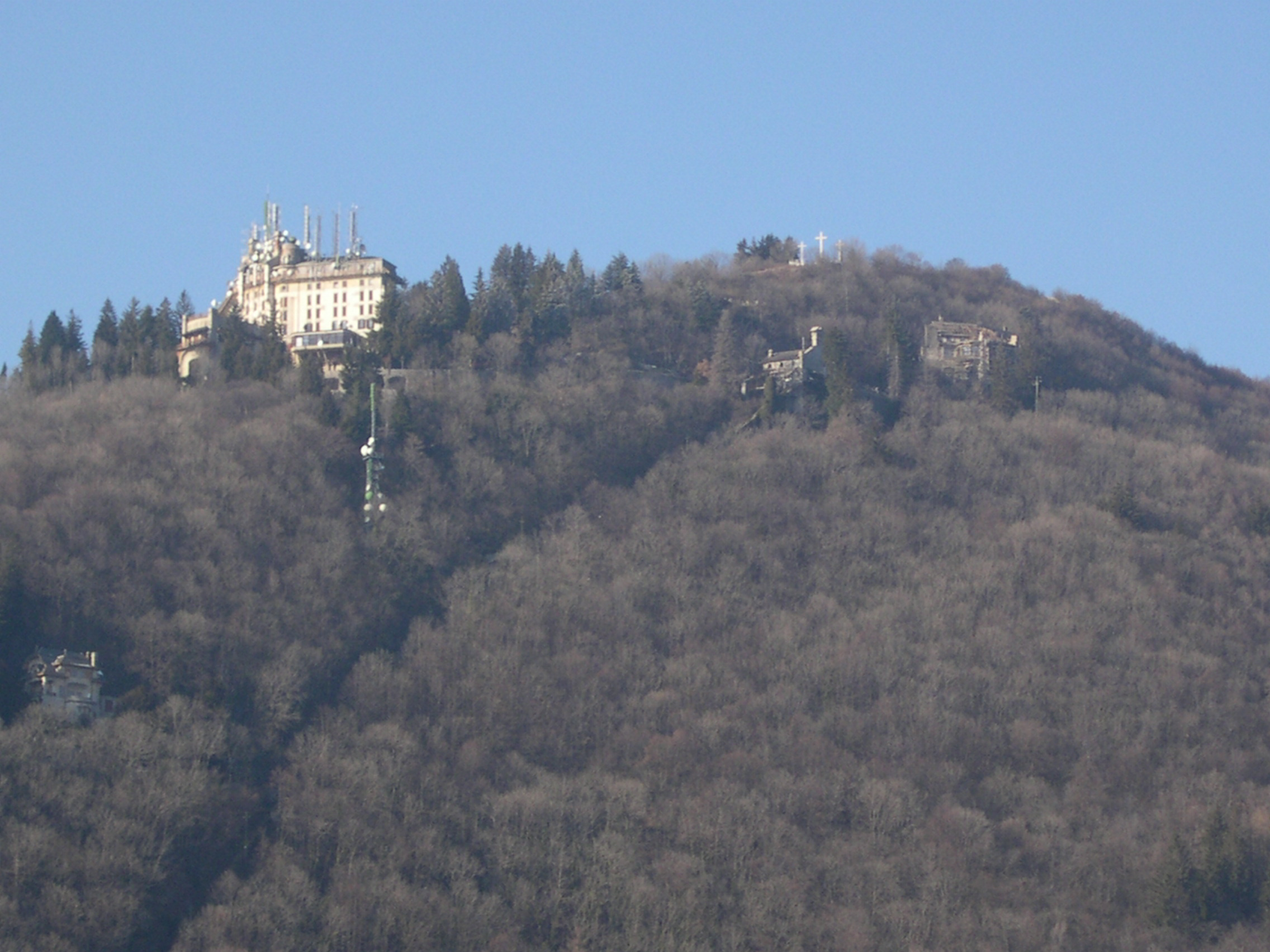 Top of Campo dei Fiori